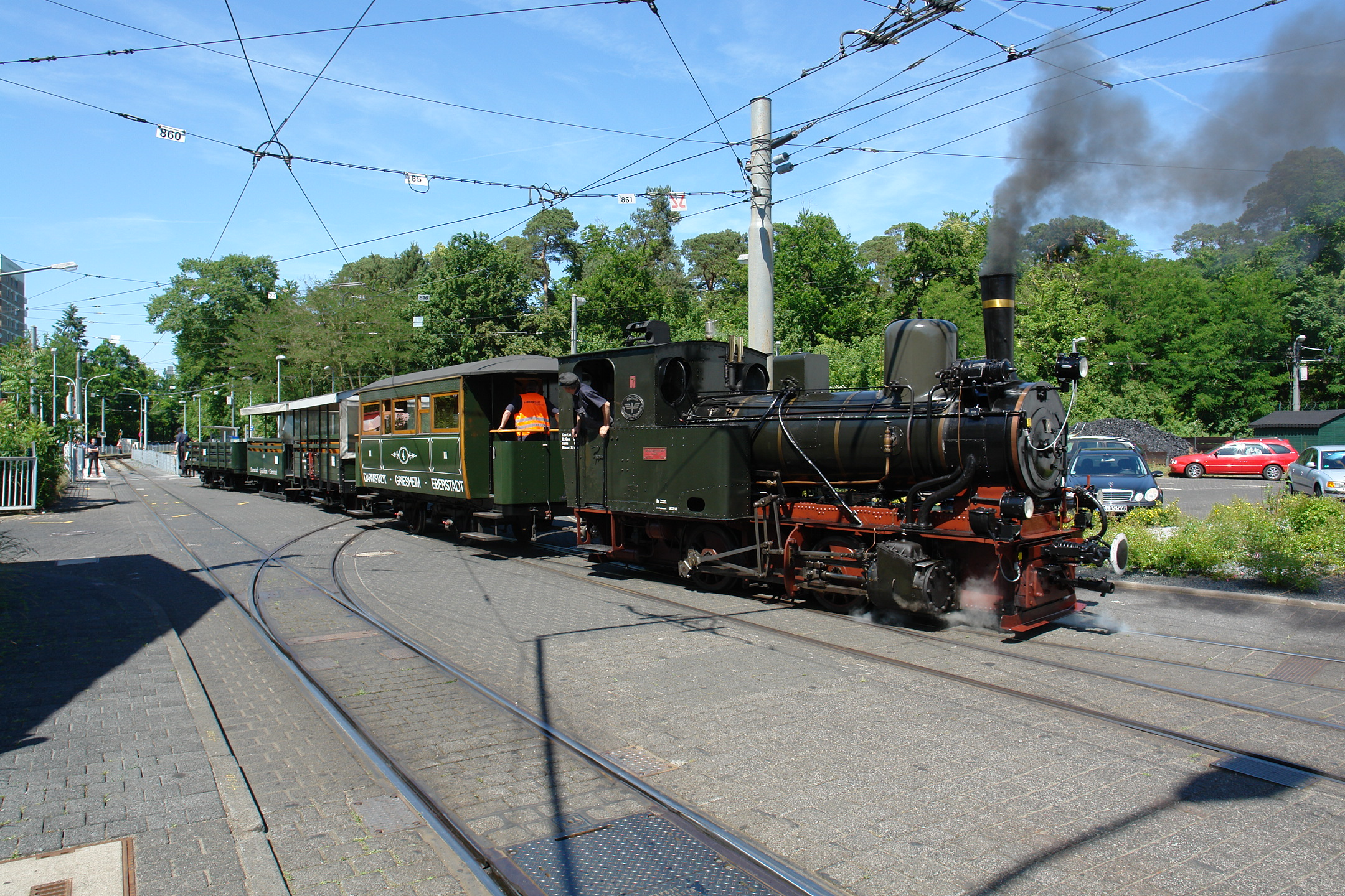 Der Feurige Elias in Darmstadt der ARGE Historische HEAG-Fahrzeuge im Eisenbahnmuseum Darmstadt-Kranichstein e.V. auf einer Fahrt von der Haltestelle Frankenstein (Seeheimer Straße 70) in Darmstadt-Eberstadt zur Haltestelle Am Hinkelstein in Alsbach am 4. Juni 2015